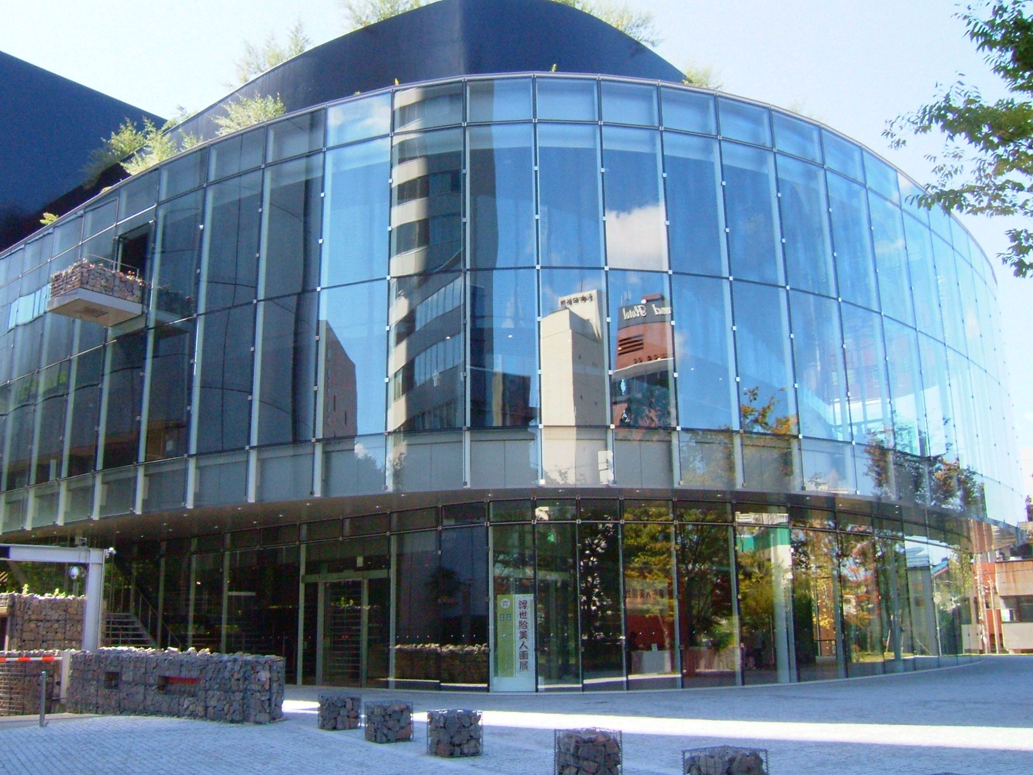 北國新聞赤羽ホール（石川県金沢市）